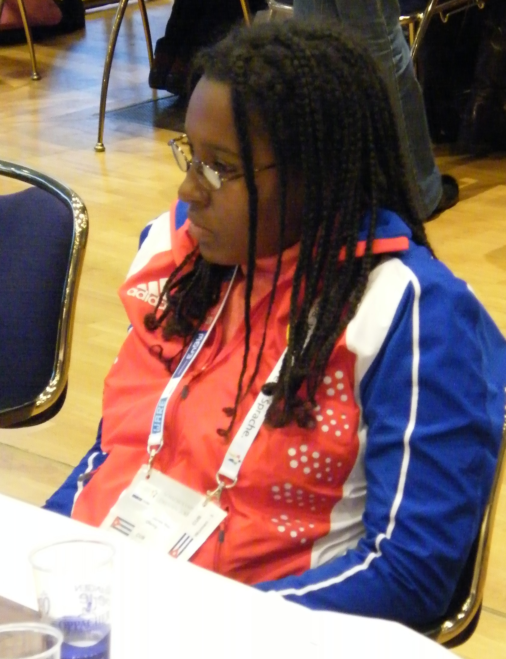 Oleiny Linares Napoles bei der 38. Schacholympiade in Dresden 2008